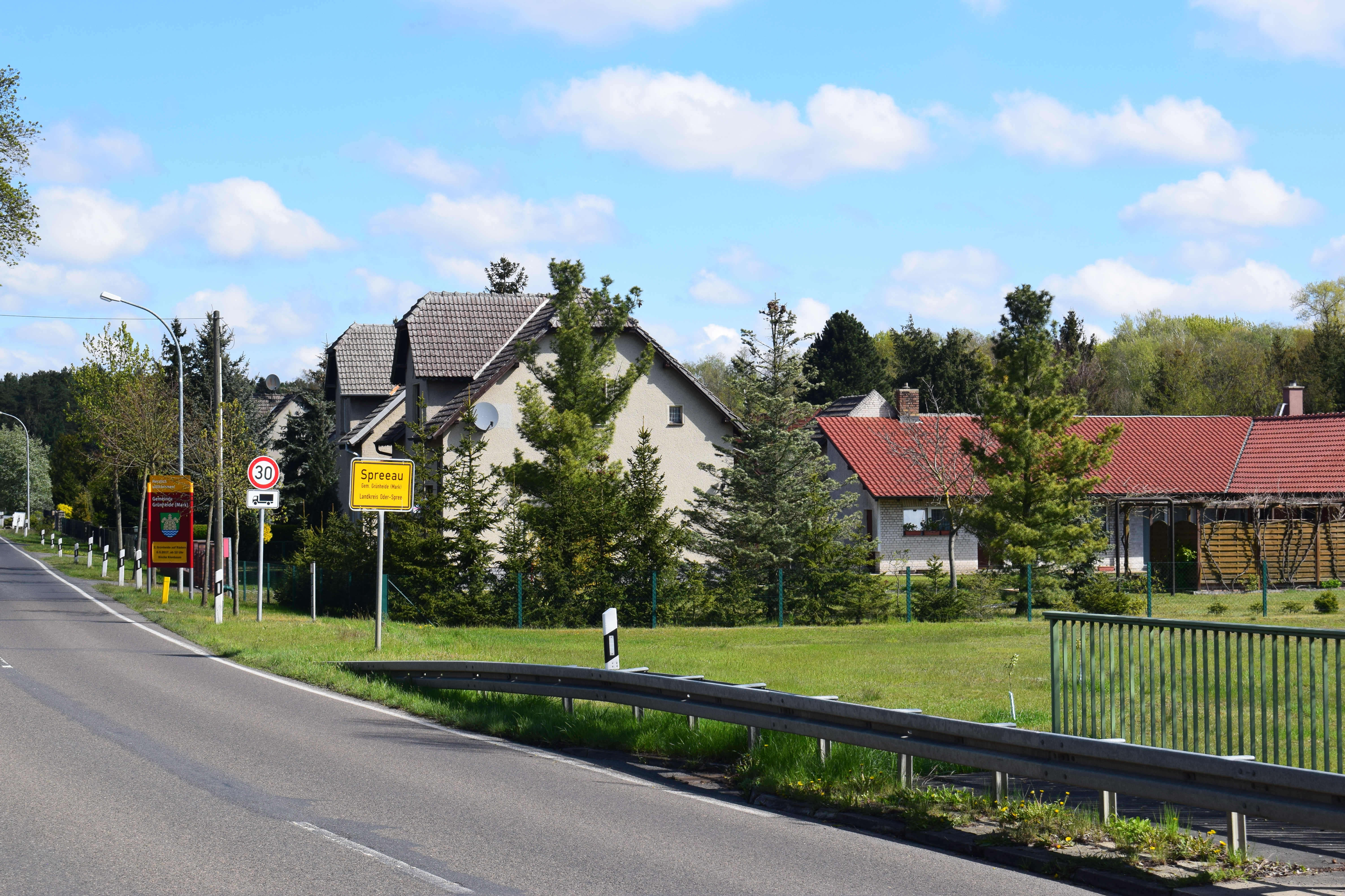 Südlicher Ortseingang von Spreeau, Grünheide (Mark), Brandenburg.